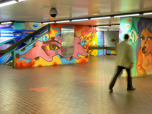 Graffiti-Kunst in der U-Bahn-Station Sedanstraße/Lister Meile in Hannover